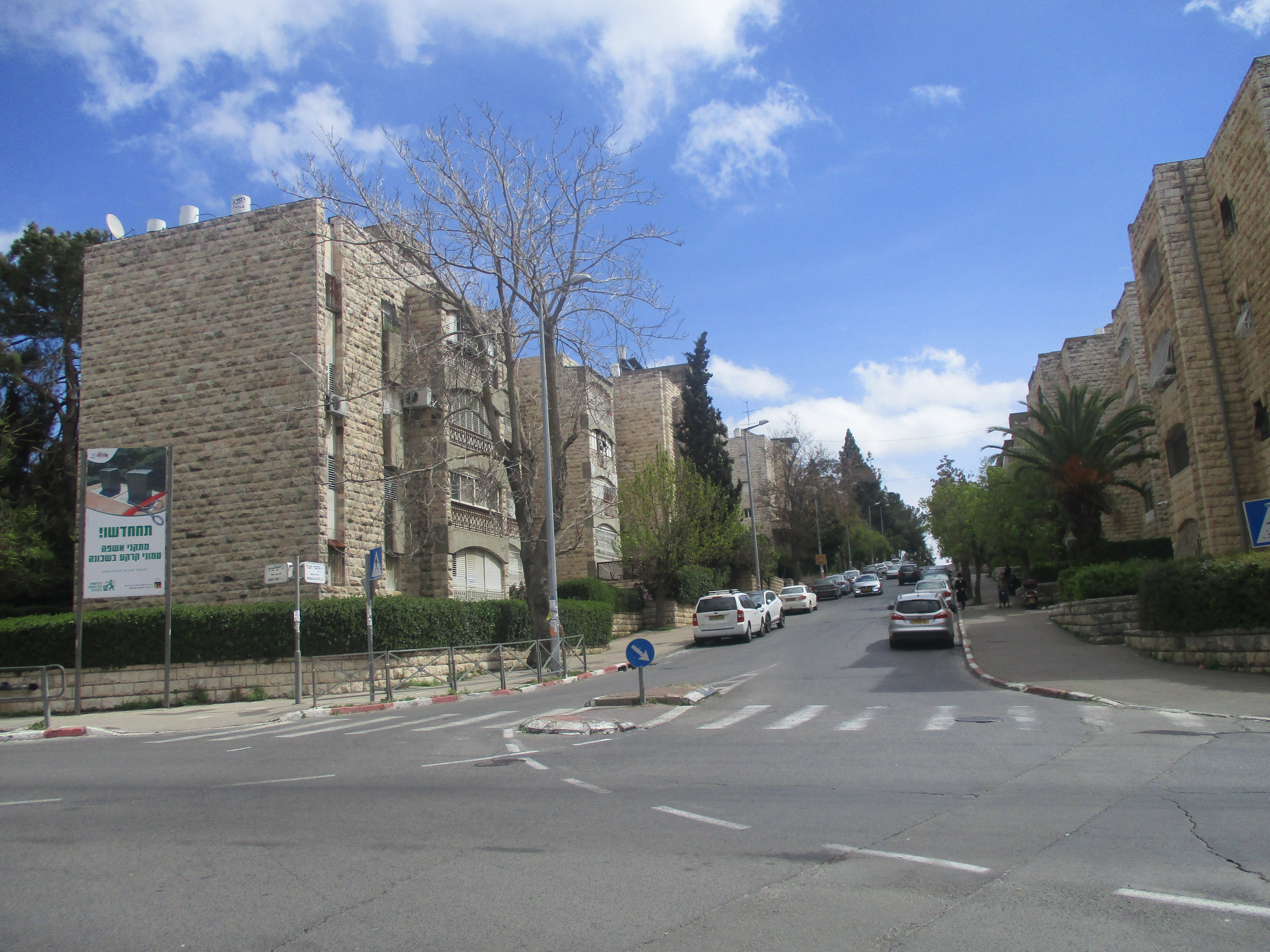 צומת הרחובות משמר הגבול, רמת הגולן וים סוף ברמות אשכול. לא הרחק משכונת סנהדריה